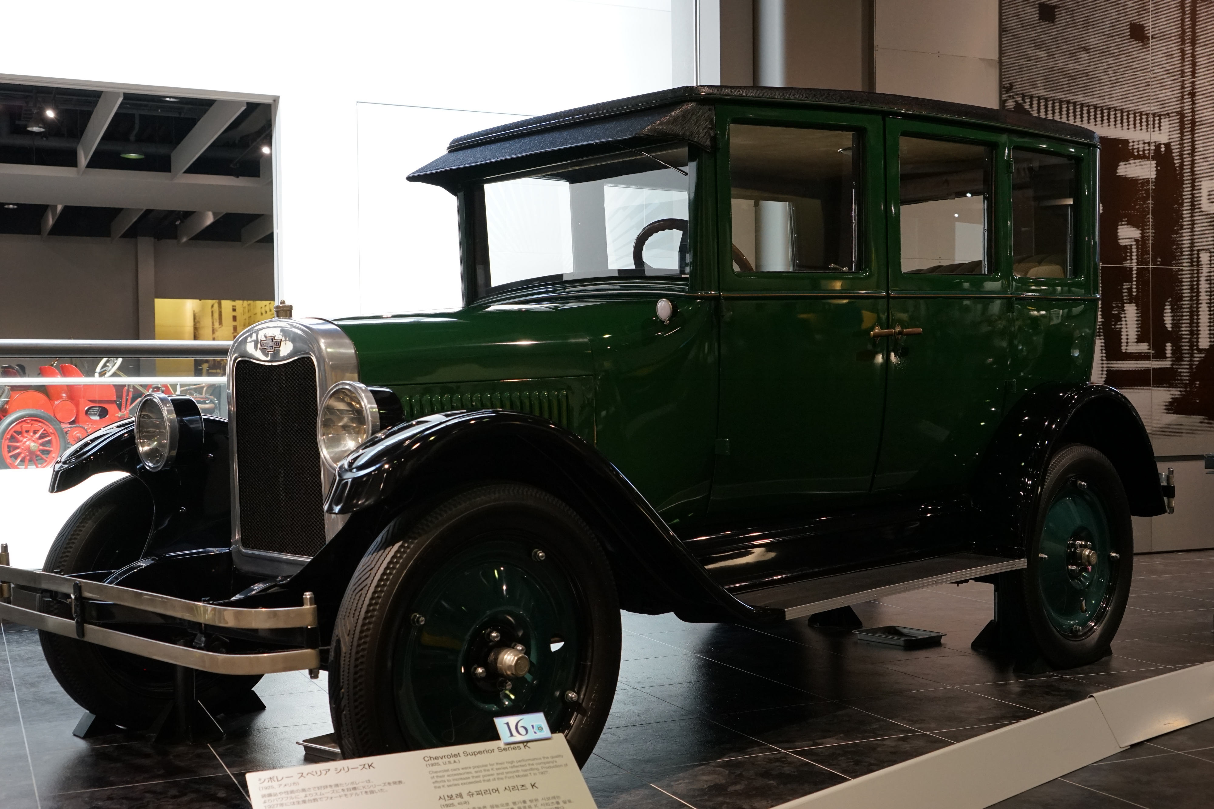 2015年9月19日、トヨタ博物館にて本人撮影